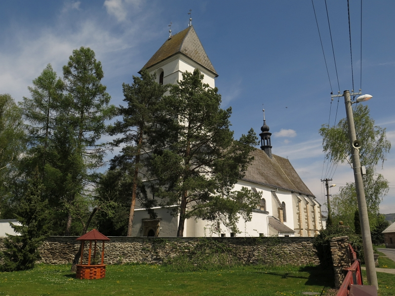 Kostel svatého Bartoloměje, Šumvaldská, Dlouhá Loučka (okres Olomouc).